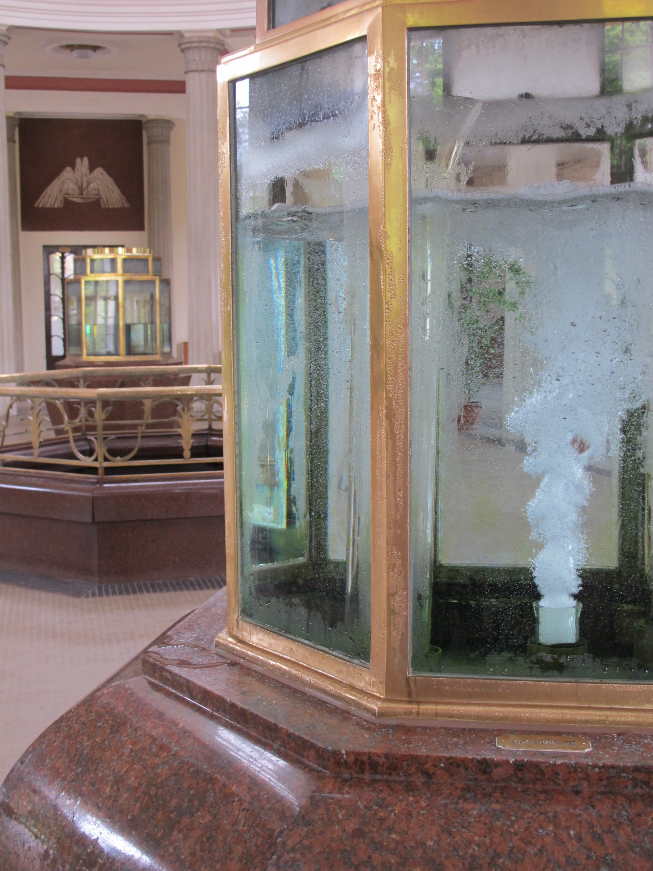 Quelle Glauberova III